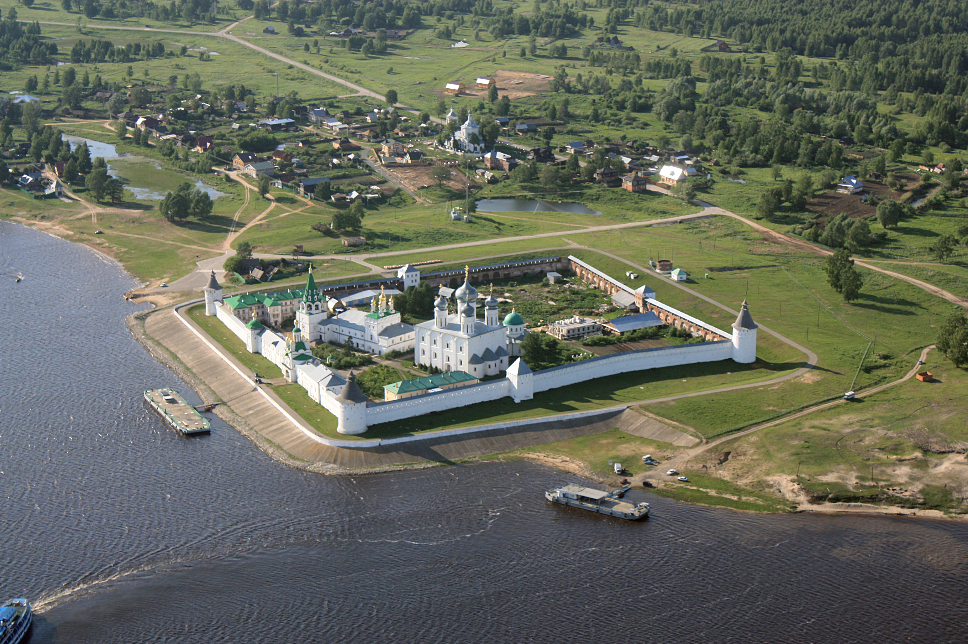 Свято-Троице-Макарьево-Желтоводский монастырь